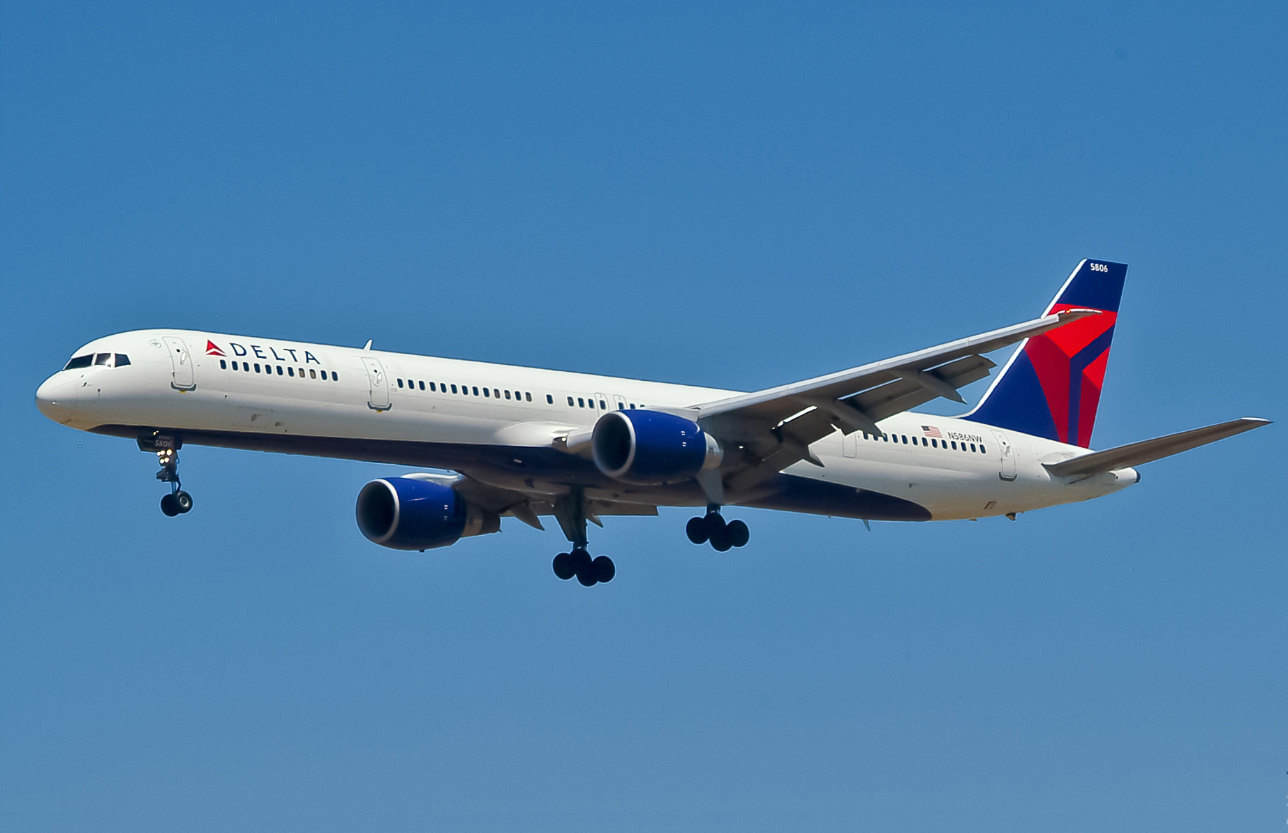 Delta 757-351